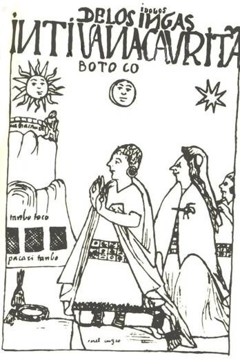 Huacas que veneraba el inca en Cuzco. Arriba el sol, la luna y el lucero, en la montaña, Uana Cauri, Tanbo Toco, o los agujeros del tampu, y Pacari Tanbo. text: "DE LOS IDOLOS INGAS INTI, UANACAURI, TAMBOTOCO" "Uanacauri" "Tambotoco" "Pacaritanbo" " en el Cuzco"